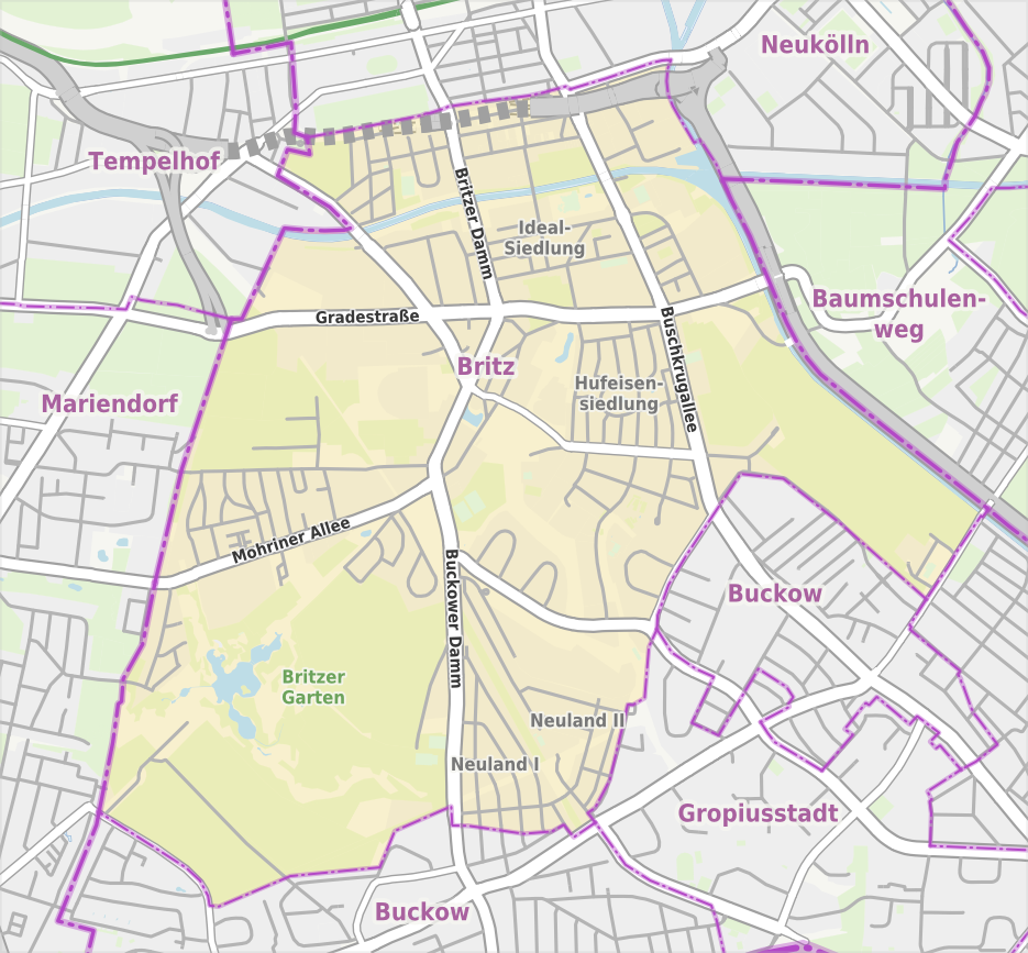 Übersichtskarte der Straßen und Ortslagen in Berlin-Britz